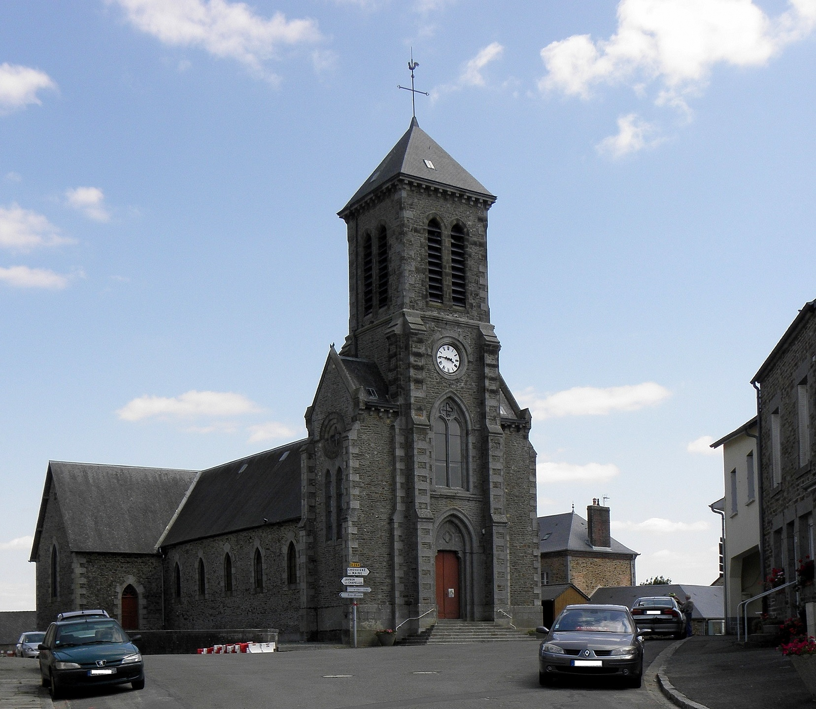 Église Saint-Maurice de Madré (53).